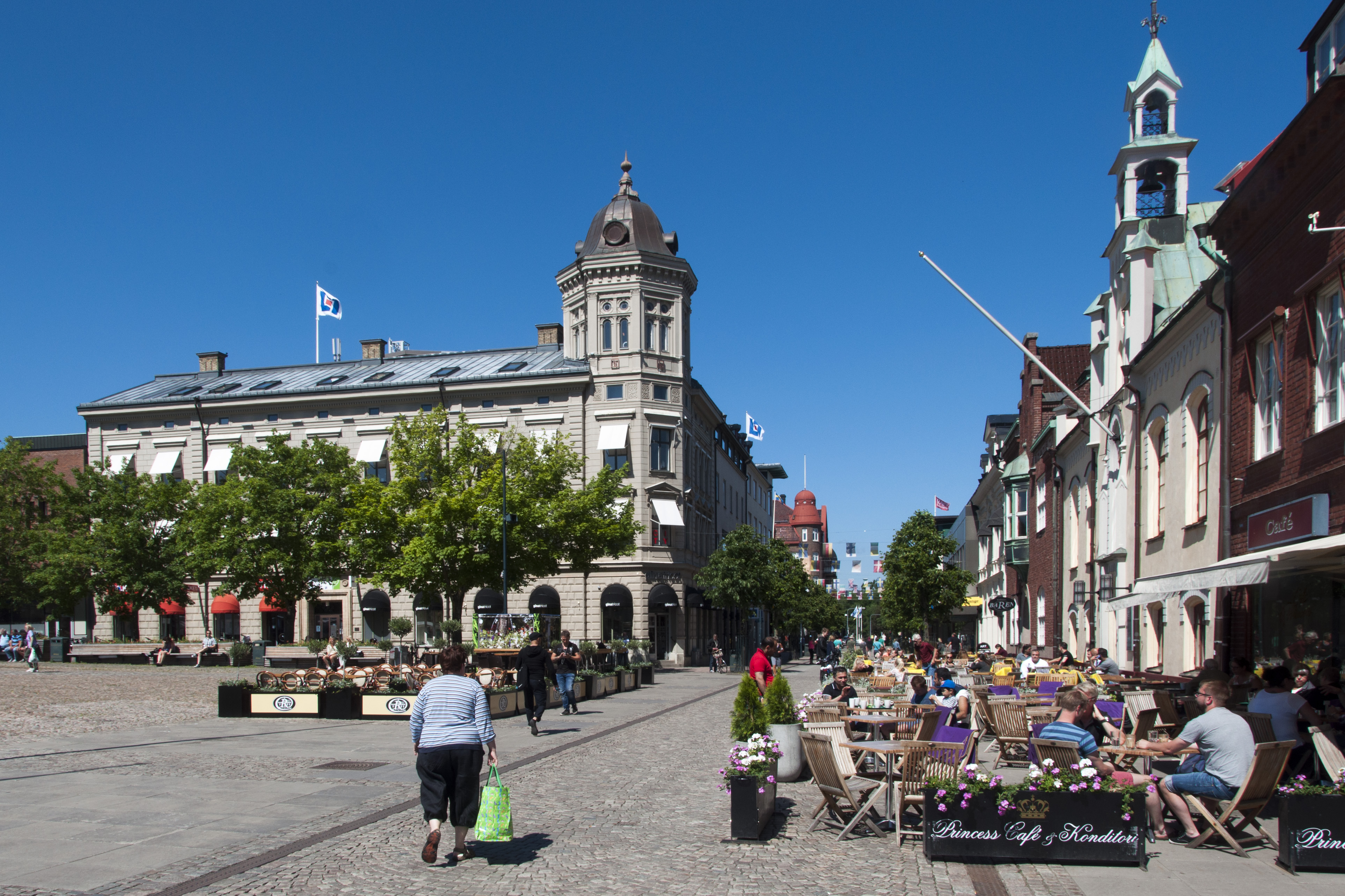 Hertig Johans torg, Skövde